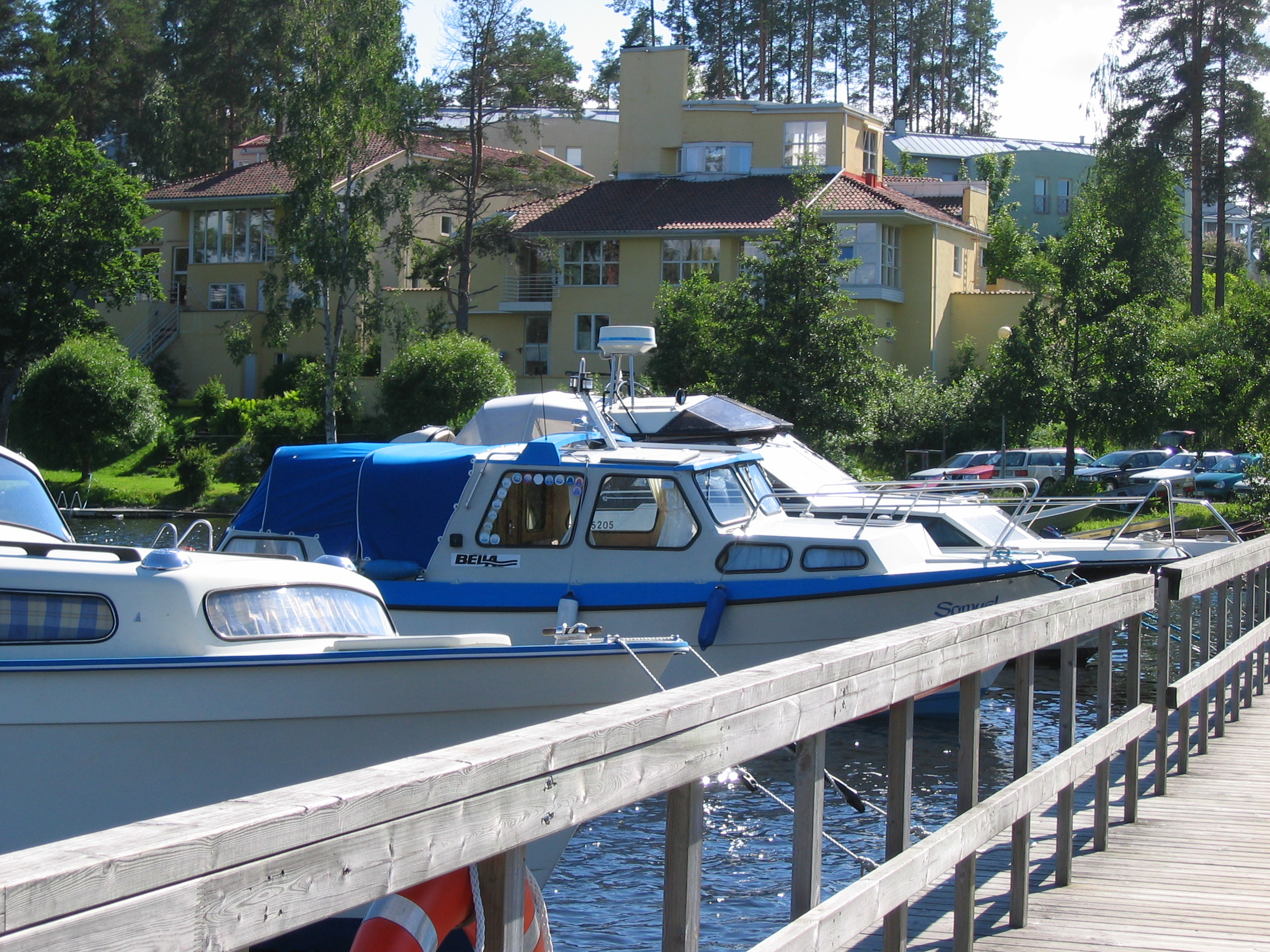 Rönön asutusalue Kuopiossa